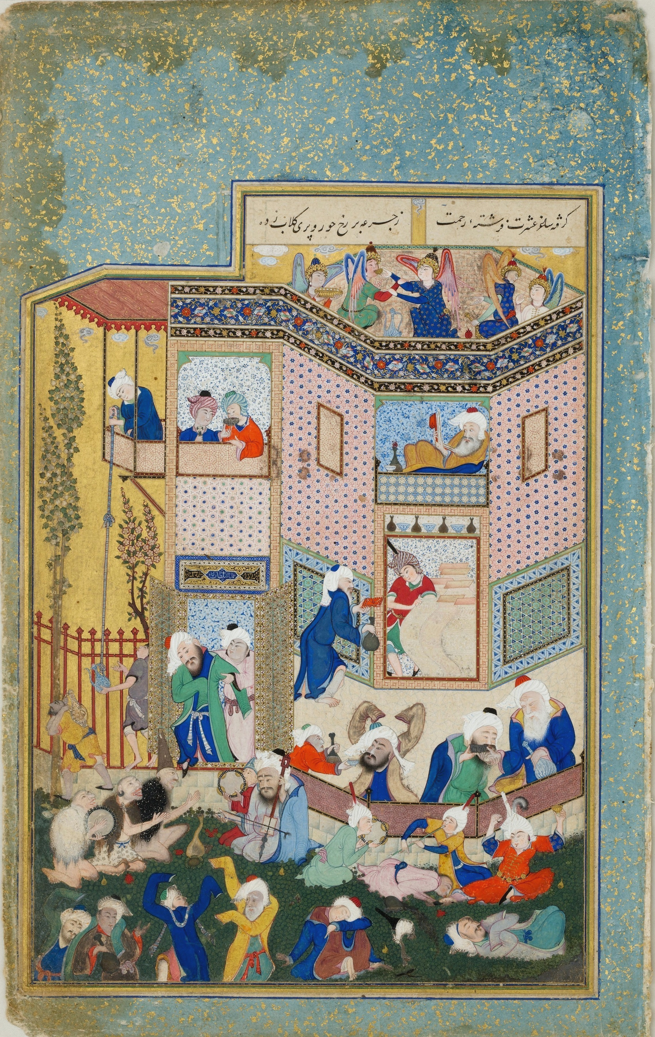 Allegory_of_Drunkenness